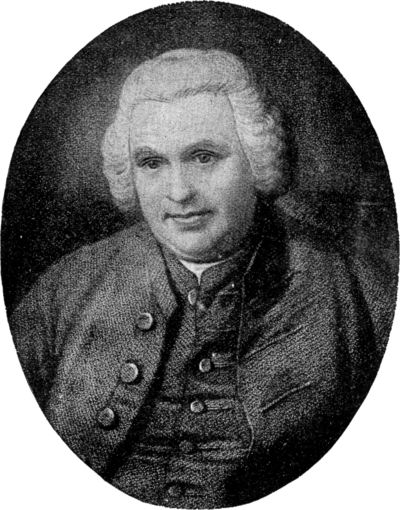 Der englische Uhrmacher und Erfinder der Ankerhemmung Thomas Mudge (1715-1794)